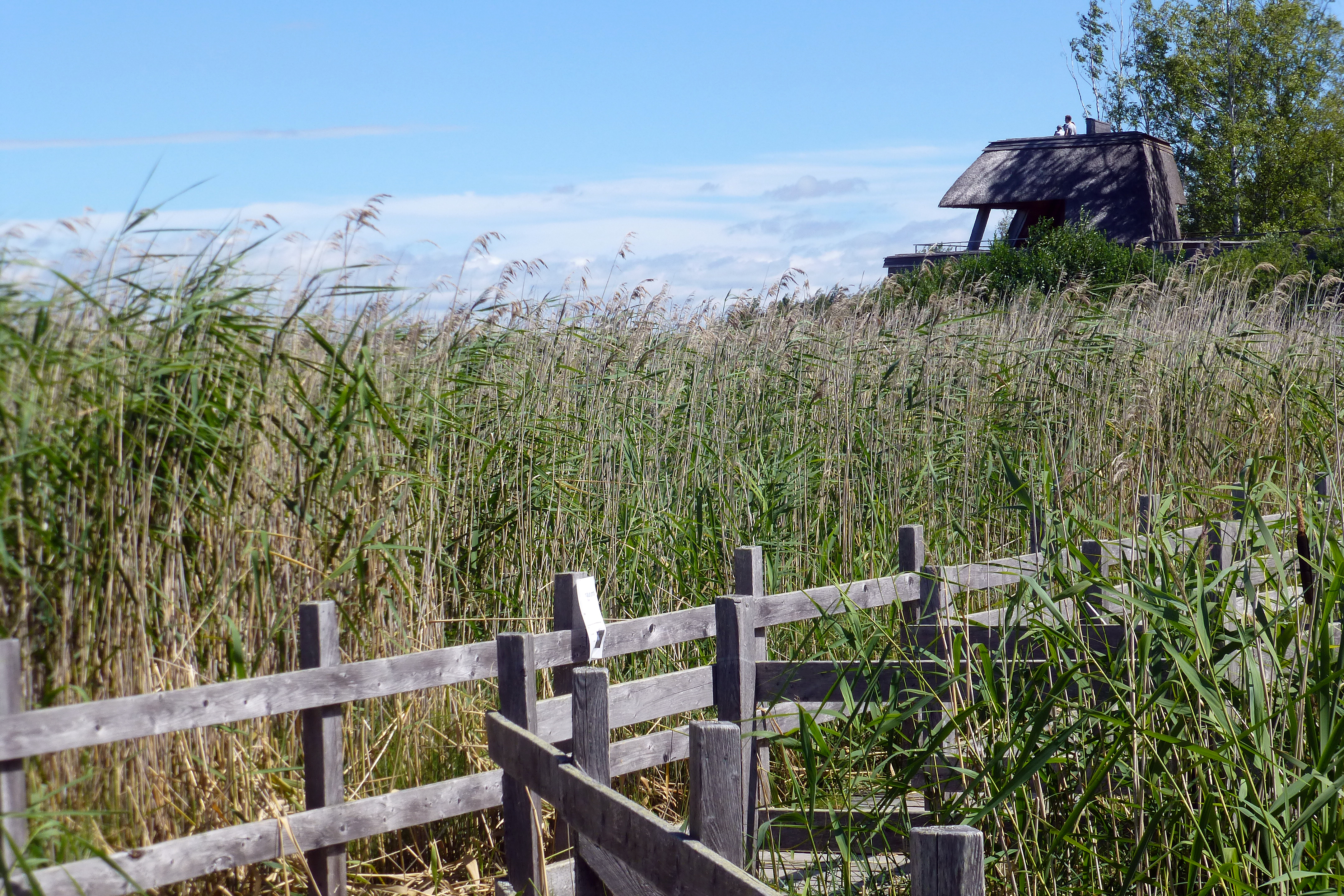 Fugletårn og udsigtsbroer